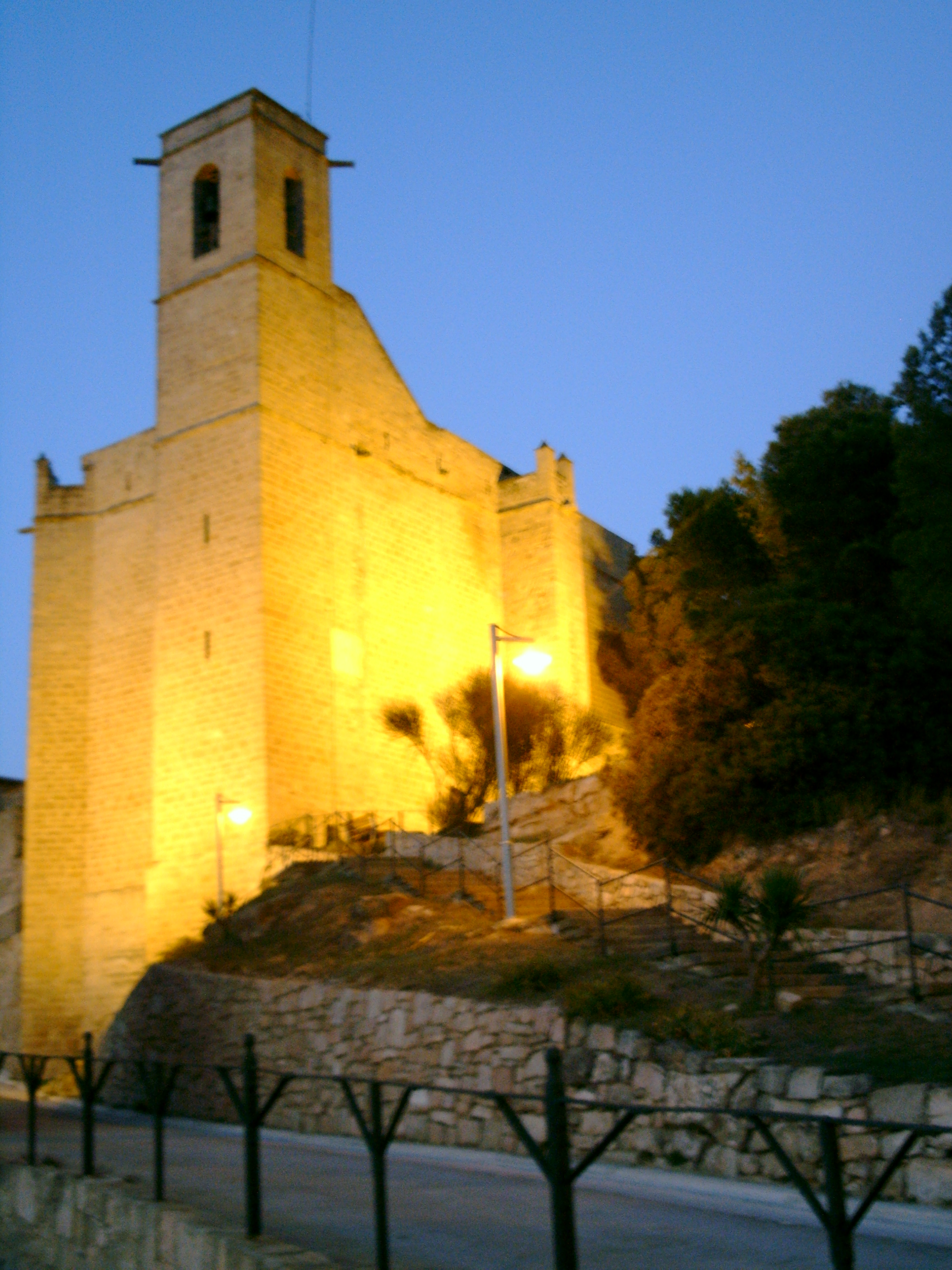 A photo of a Església de Santa Maria de Rubió